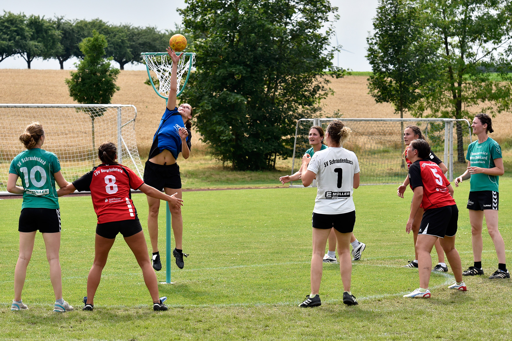 Korbfrau Lena Hünlein (TSV Bergrheinfeld) beim Parieren eines Korbwurfs im Spiel gegen den SV Schraudenbach bei den Bayerischen Meisterschaften im Feldkorbball 2016 in Euerbach.